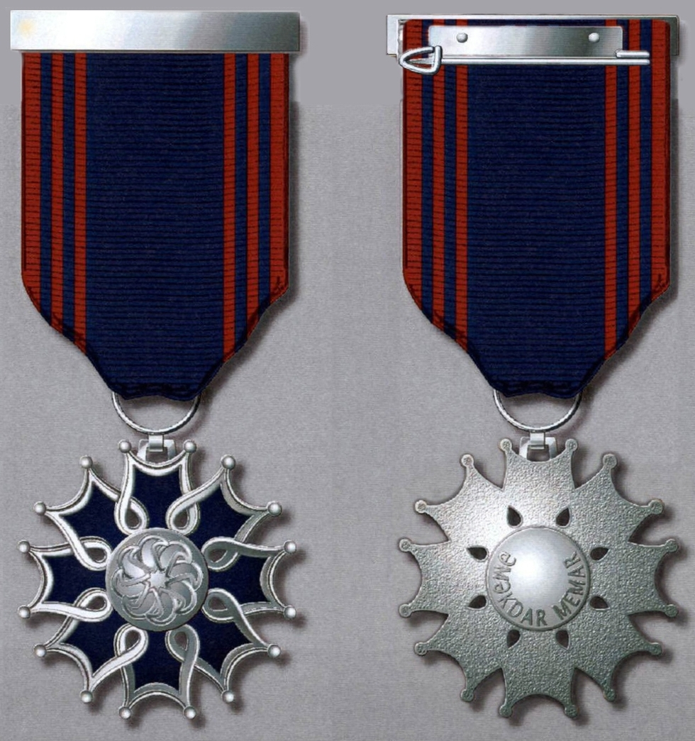 “Əməkdar memar” fəxri adının döş nişanı